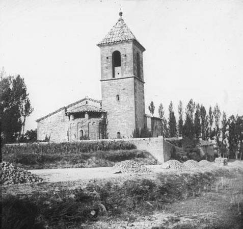 Vista general de Sant Martí de Riudeperes. Frederic Bordas i Altarriba (ca. 1890)